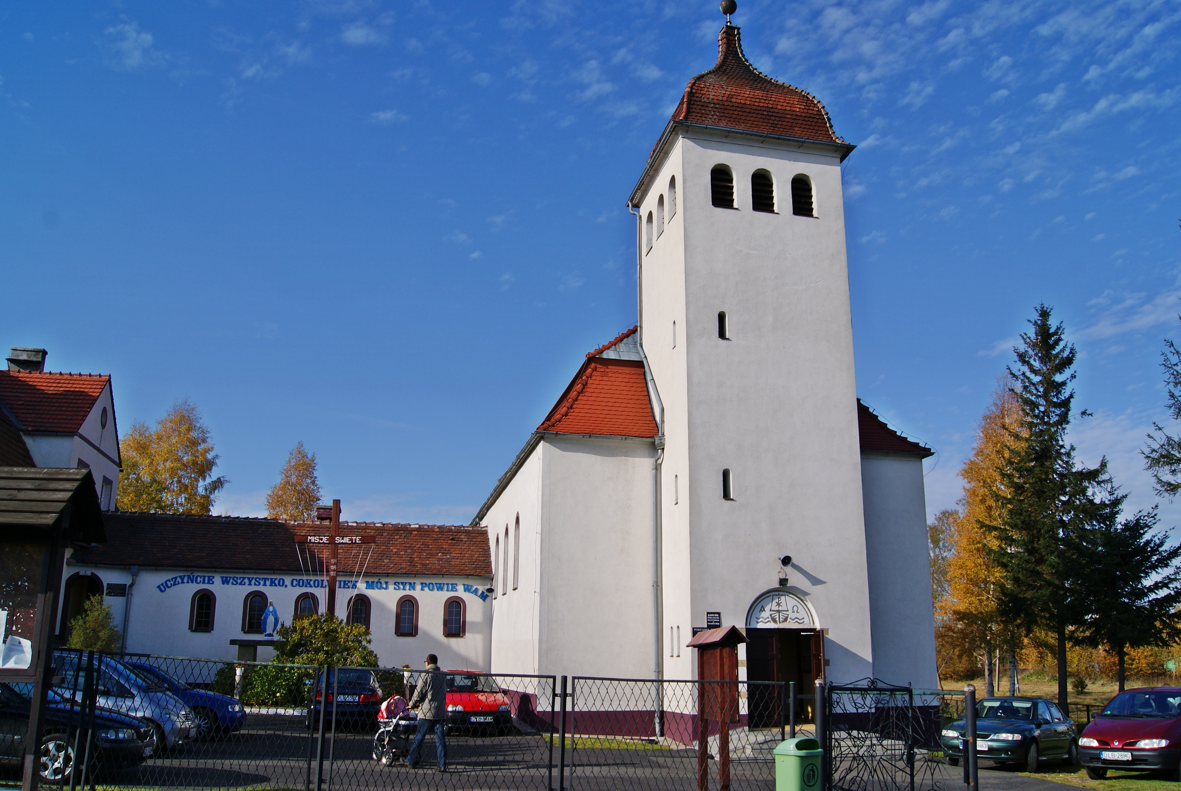 Czerniawa-Zdrój - kościół pw. Podwyższenia Krzyża z 1934-37 r. (zabytek nr 340/1340/J z 3.08.98)